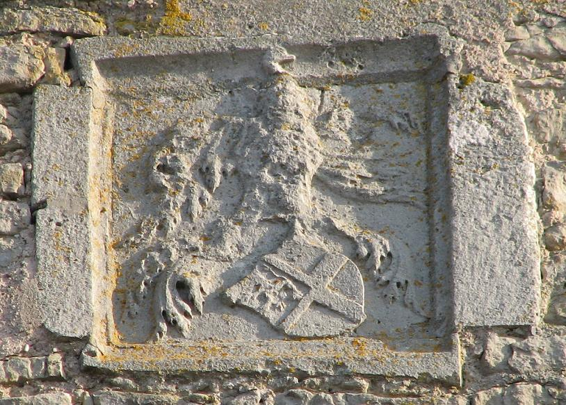 Photo du blason inséré dans la face Nord du clocher